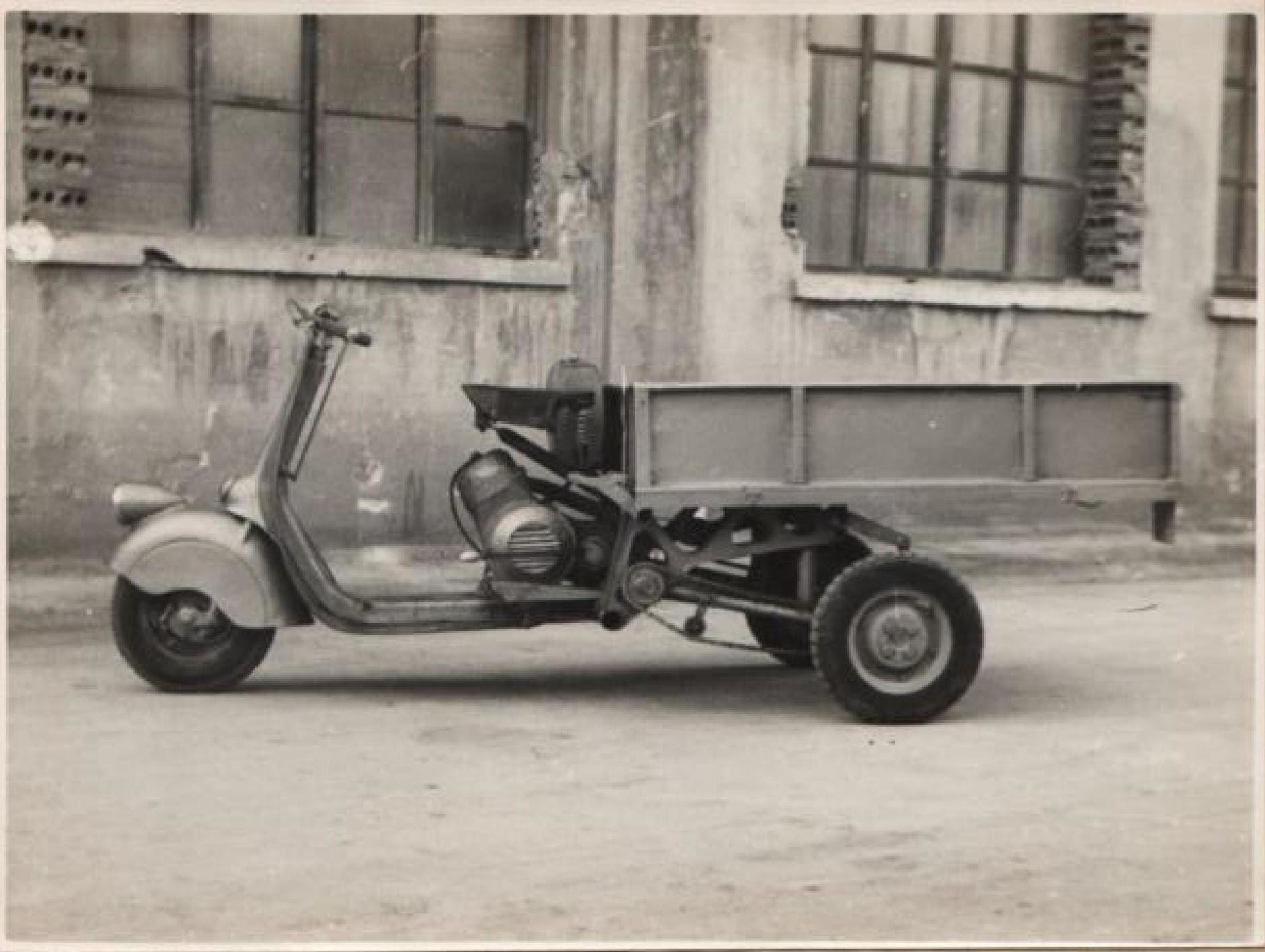 Relazione tecnica sulle caratteristiche del motofurgone Ape, Piaggio 1948. Alla Fiera di Milano del 1946 l'Ape riscosse molto successo e, grazie anche al suo basso costo, ebbe ampia diffusione nell'Italia meridionale del secondo dopoguerra (AS Pescara, Archivio privato D'Ascanio Corradino, b. 7, fasc. 157, n. 238)